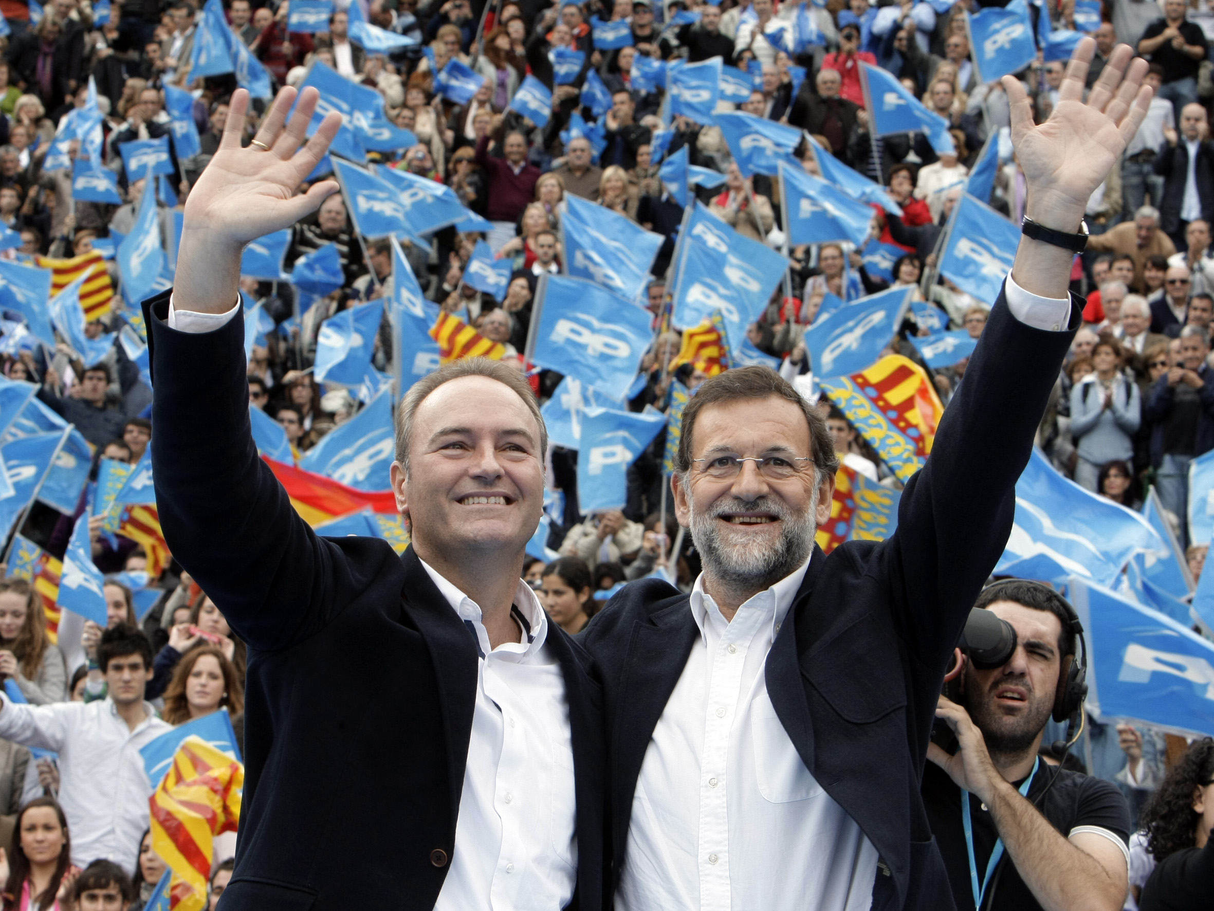 Fabra i Rajoy al míting central de València.